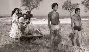 Pel·lícula de Ramon Monfà, La horda